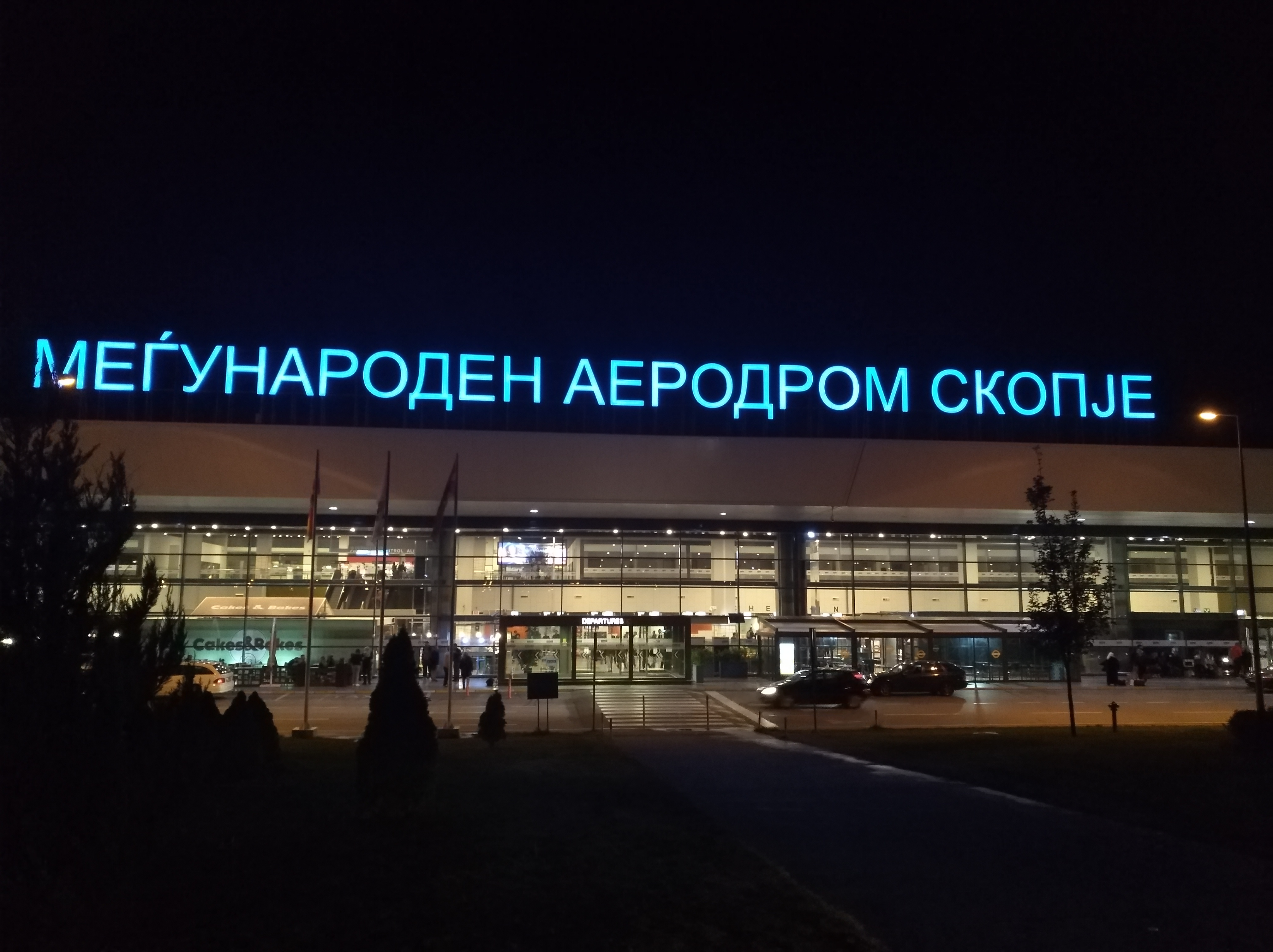 Vue nocturne de l'entrée principale de l'aéroport international de Skopje (Macédoine).